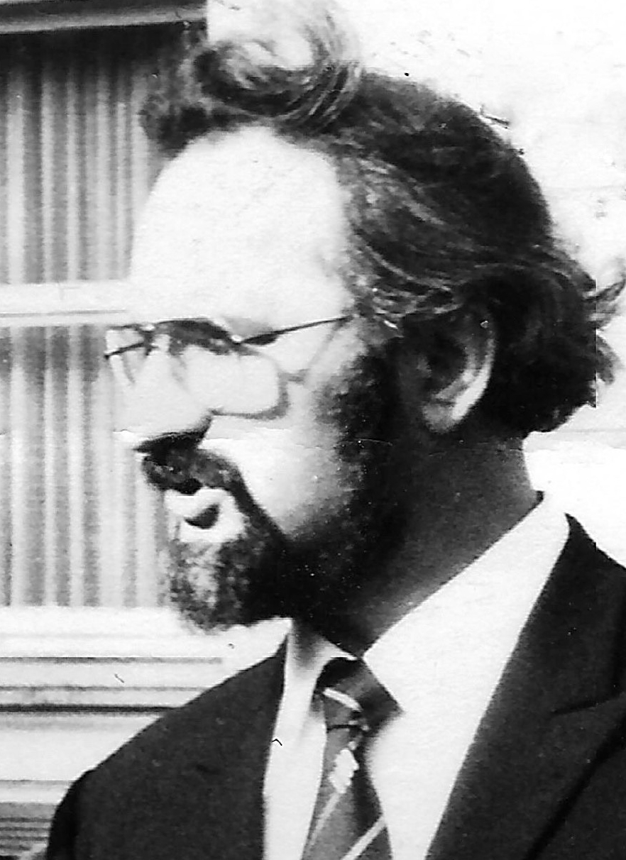 Portrait Siegfried Liebschner, Dozent für Praktische Theologie am Theologischen Seminar Hamburg-Horn